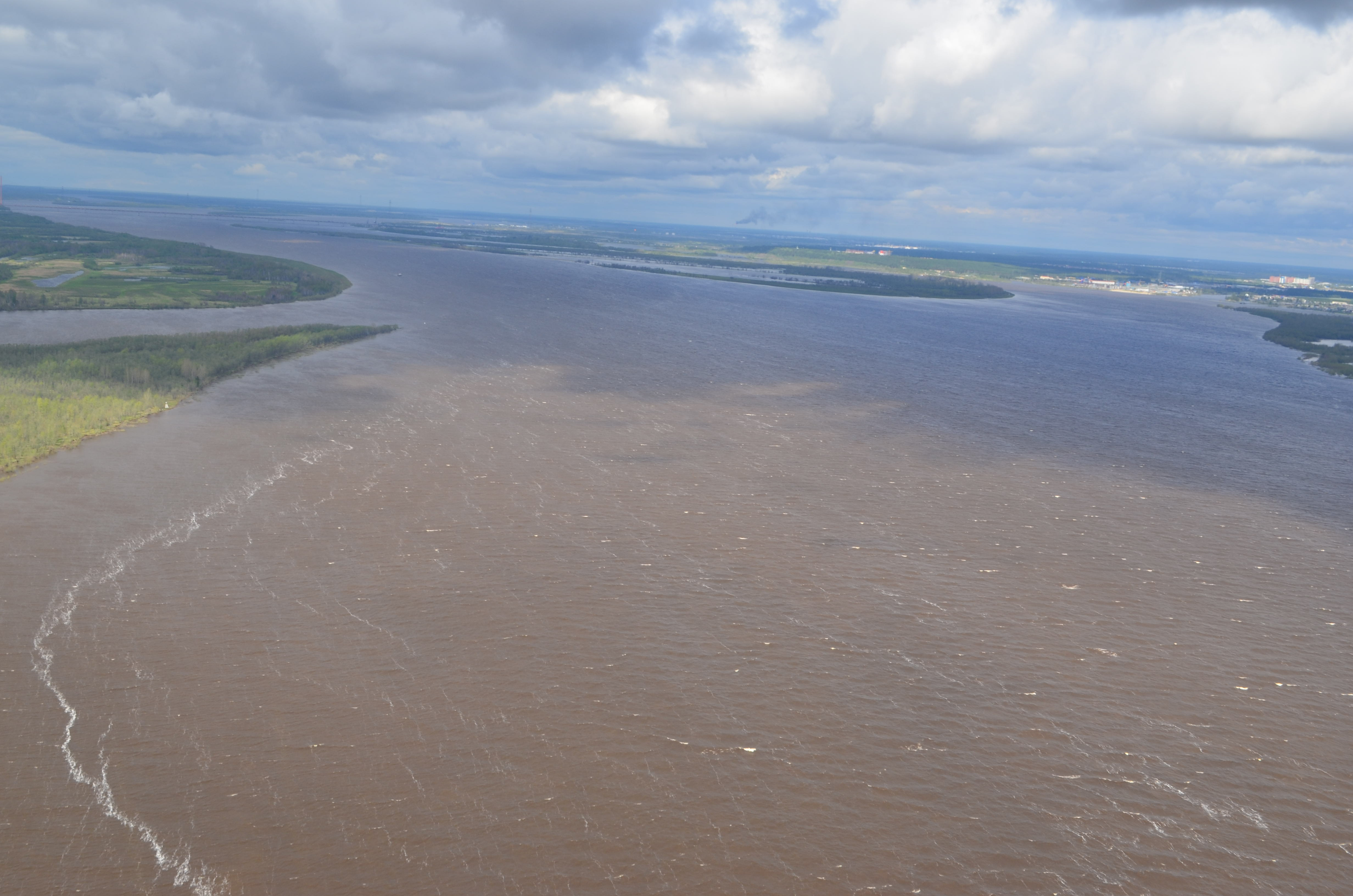 Великая Обь